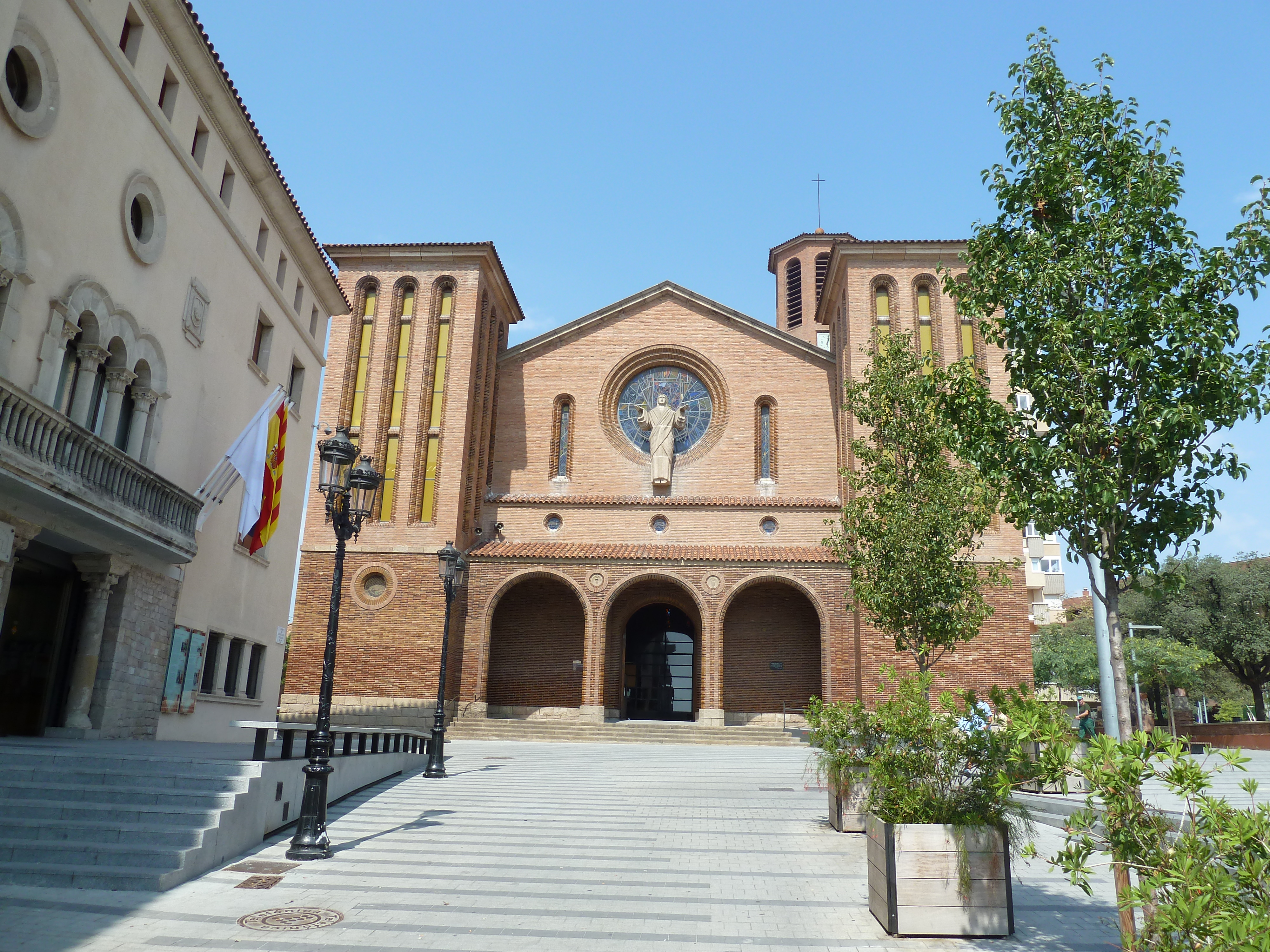 Cornellà de Llobregat.